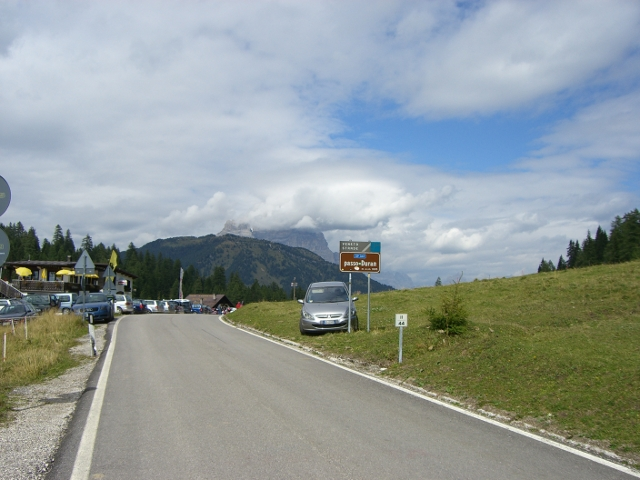 Passhöhe am Passo Duran